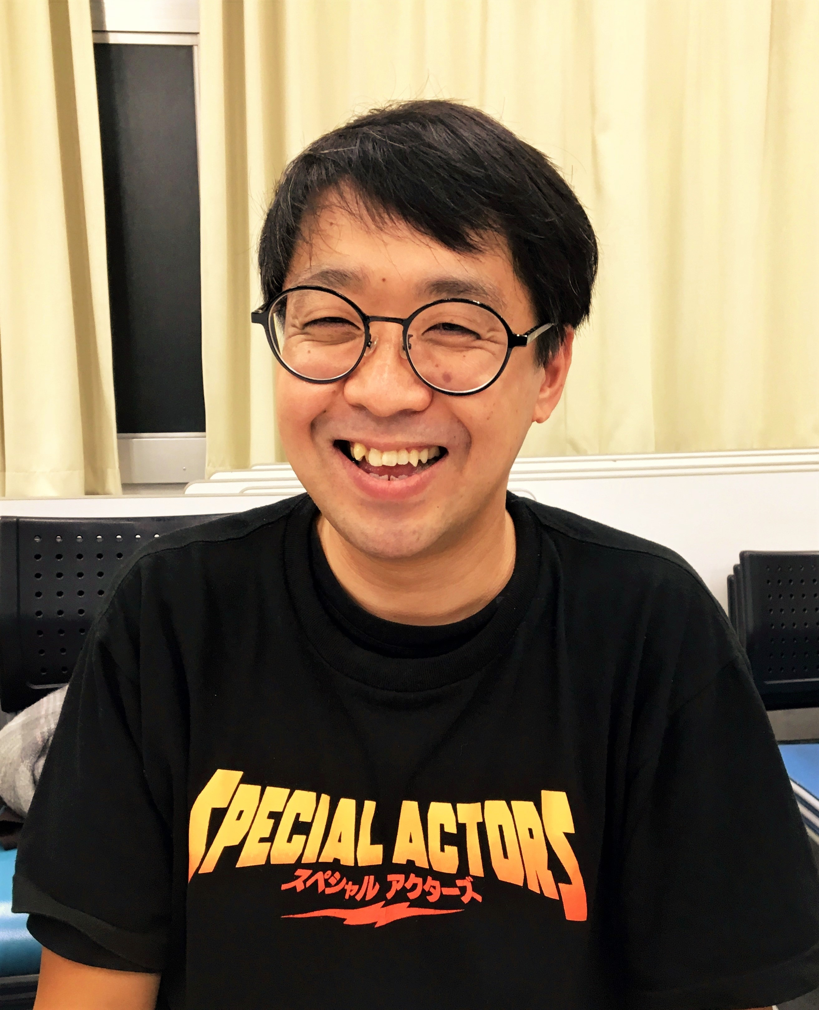 「スペシャルアクターズ ネタバレ全開トークショー」（東京学院ビル3F）に参加した富士松卓也役の俳優・富士たくや